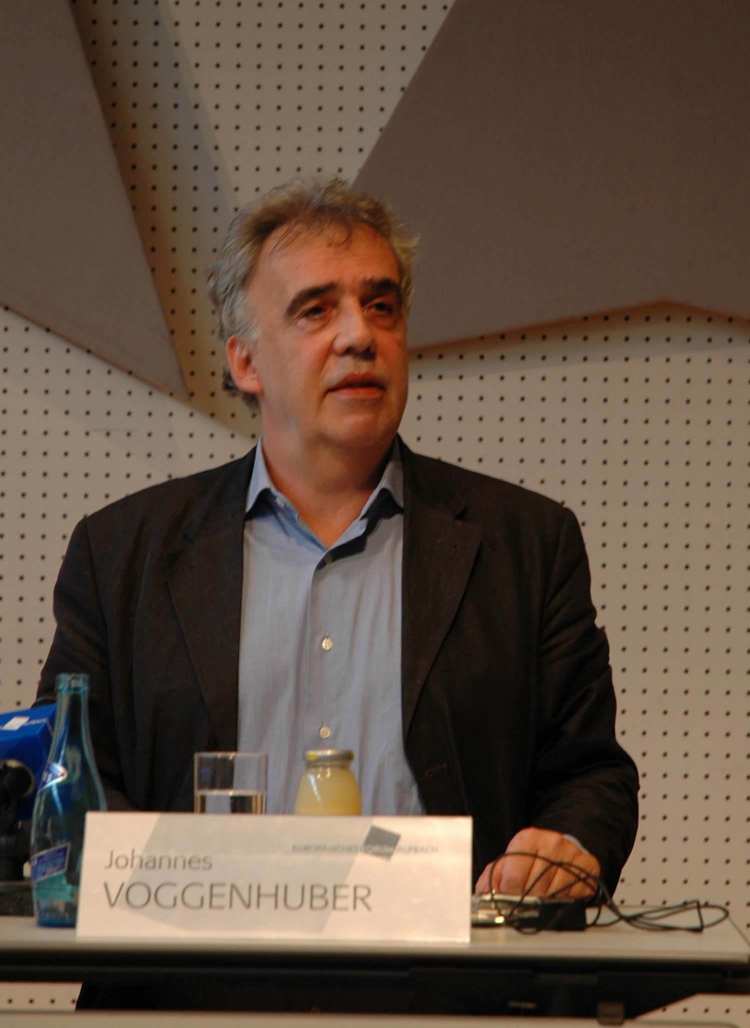 Johannes Voggenhuber, Grün-Abgeordneter zum Europäischen Parlament, bei einer Diskussion im Rahmen des Europäischen Forums Alpbach, Tirol.